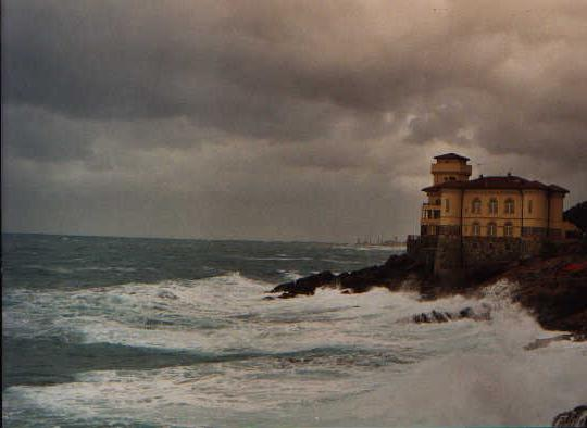 Il Castello del Boccale, sul Romito, il lungo il tratto di strada costiera verso Castiglioncello.